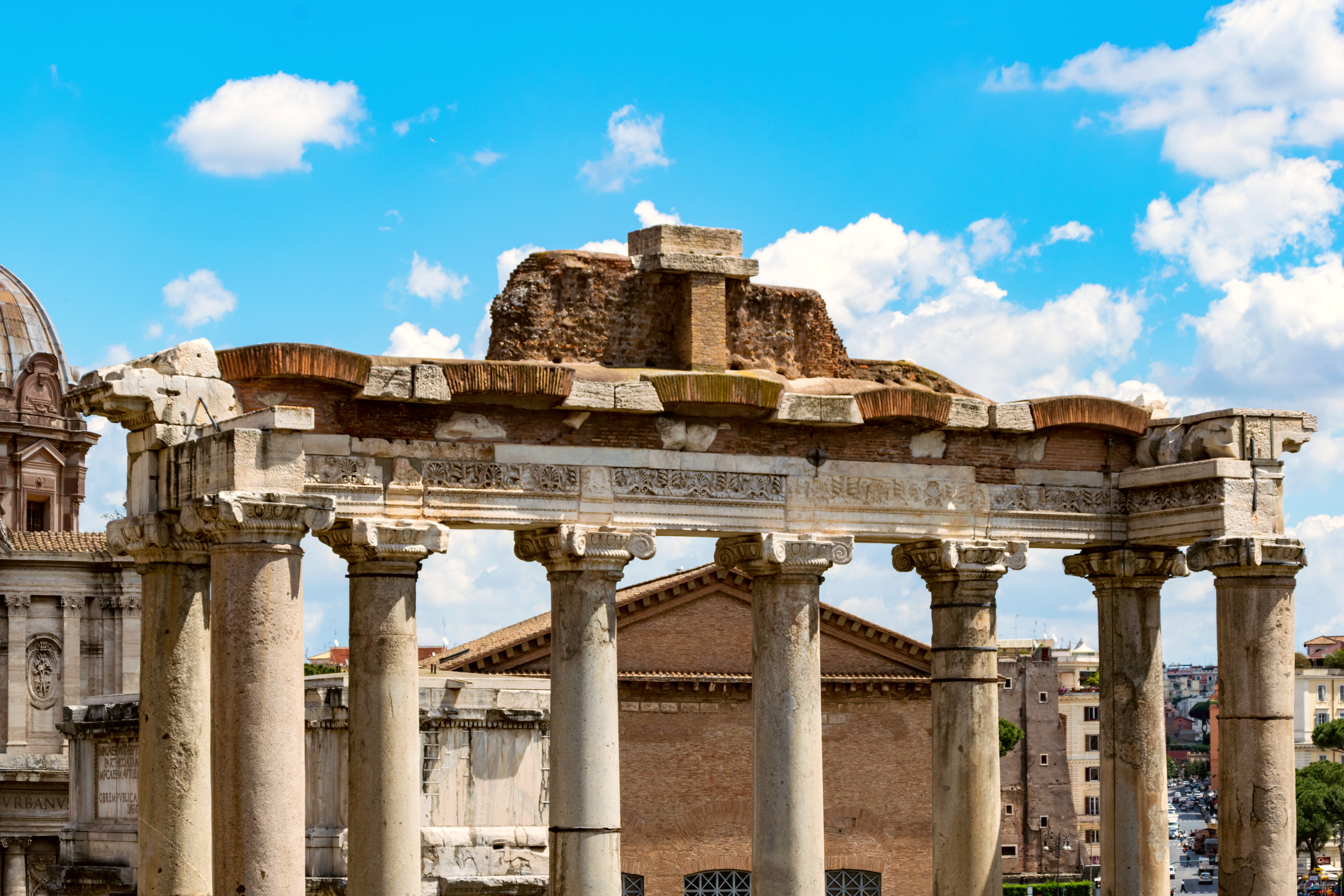 Die Gebälkrückseite von der Vorhalle des Saturntempels